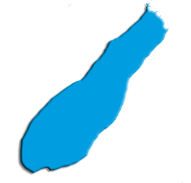 Mapa de la Laguna Jara, del departamento del Beni, Bolivia.